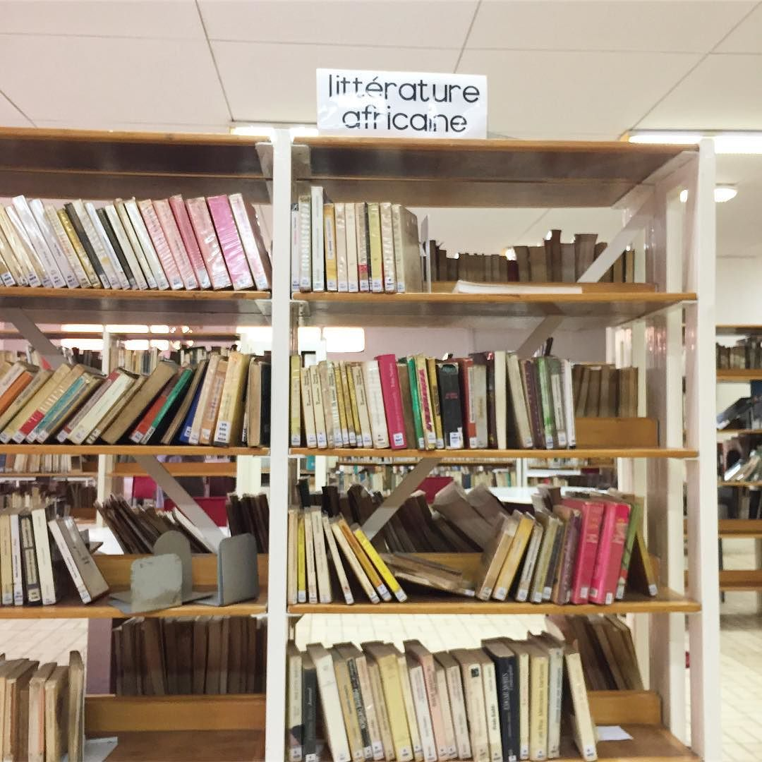 via Instagram ift.tt/2iJm4fy